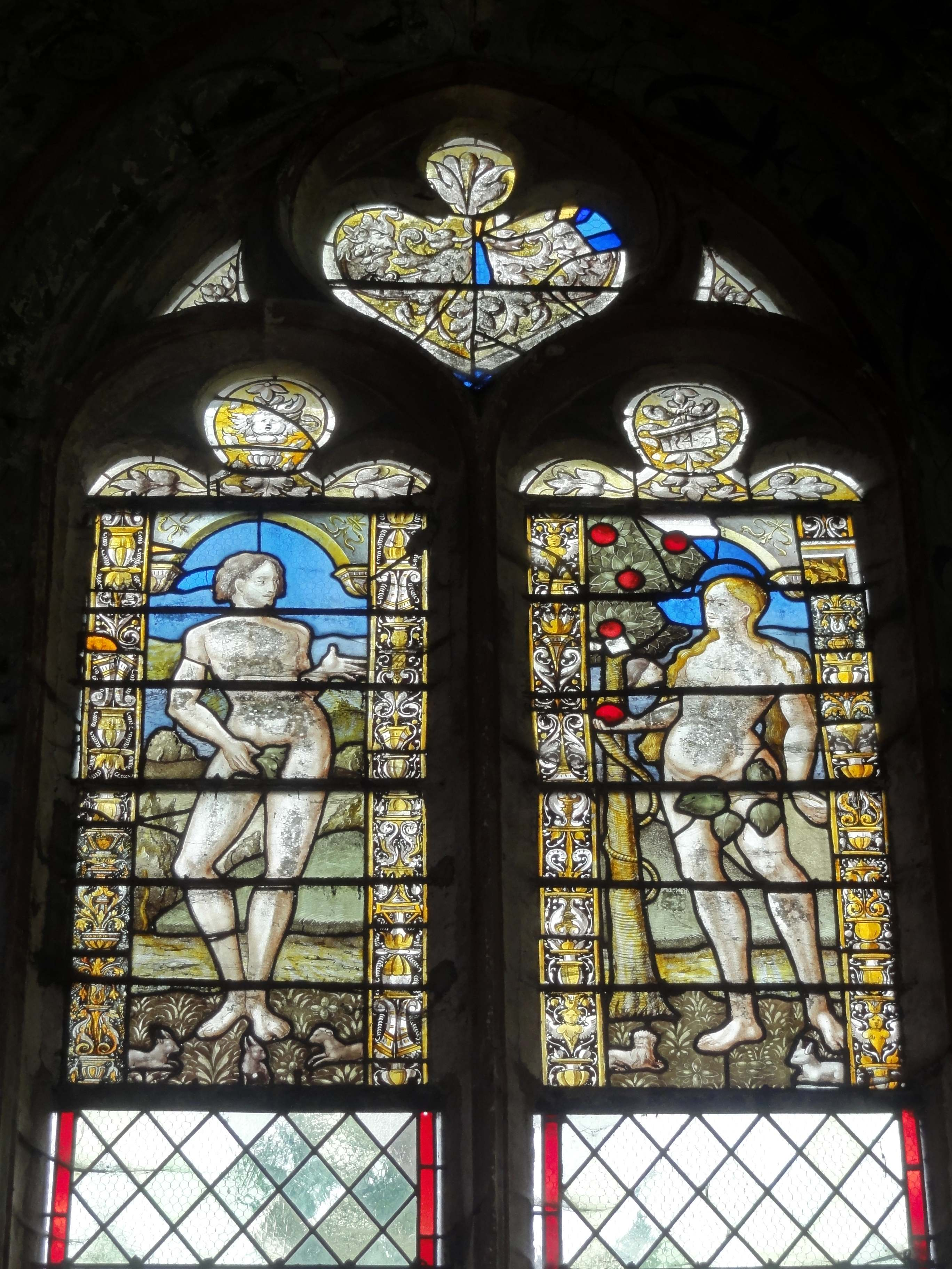 Vitraux Renaissance de l'église, verrière n° 5 : tentation d'Adam et Ève.